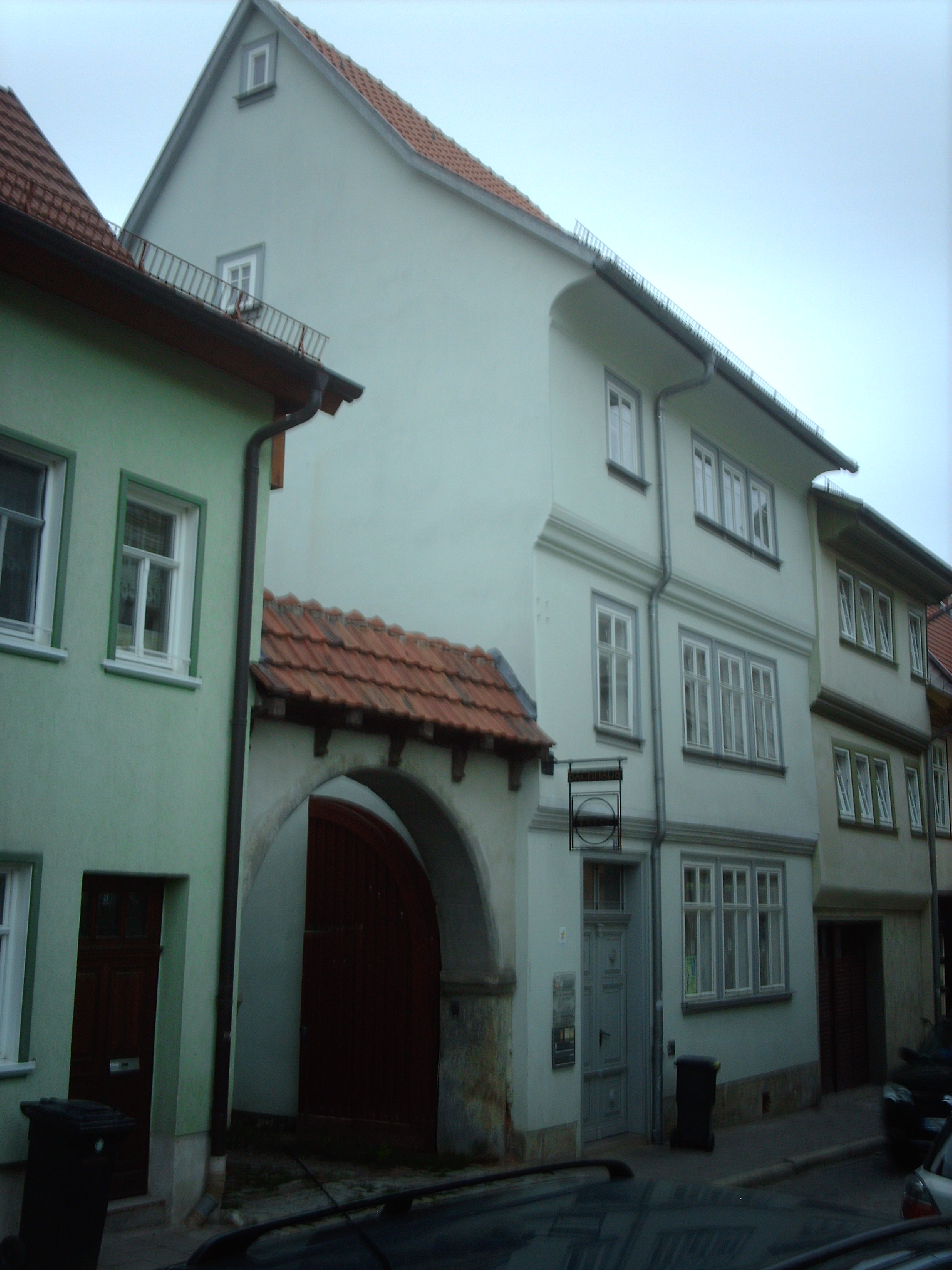 Bachhaus in Arnstadt, Kohlgasse 7